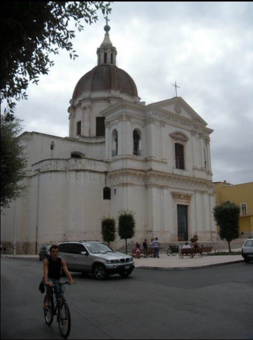 rasky, opera propria, Chiesa di Sant'Agostino